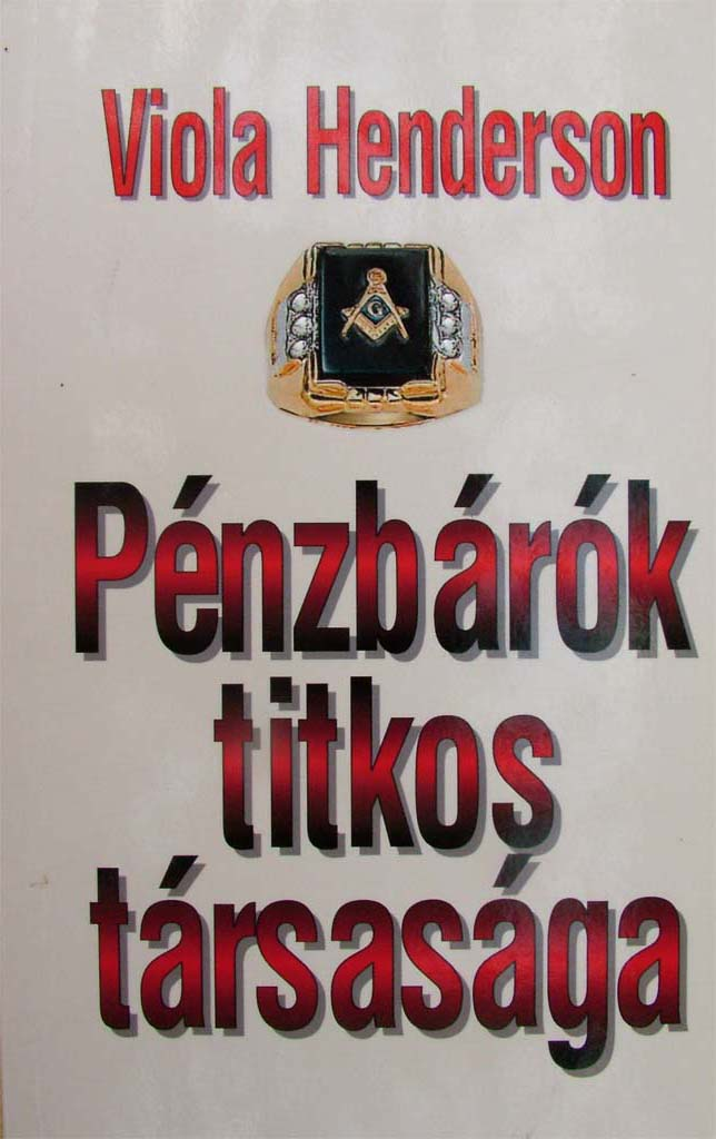 Pézbárók titkos társasága